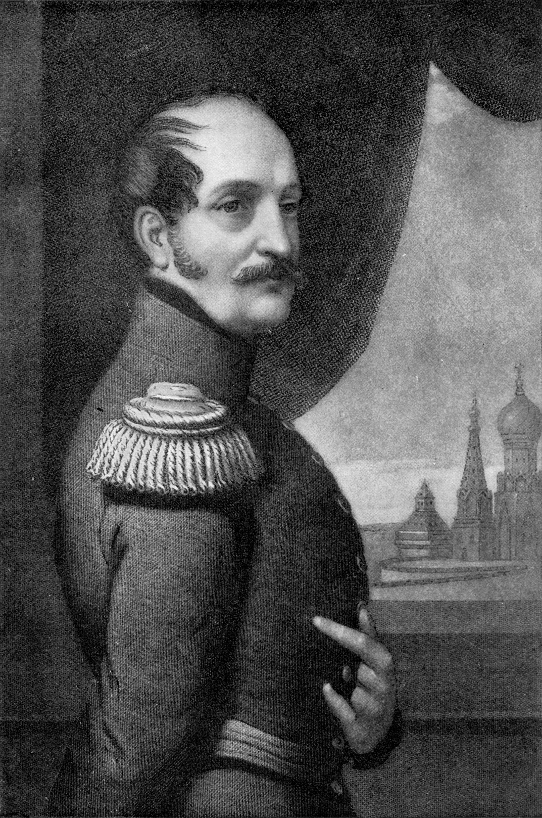 NICHOLAS I.